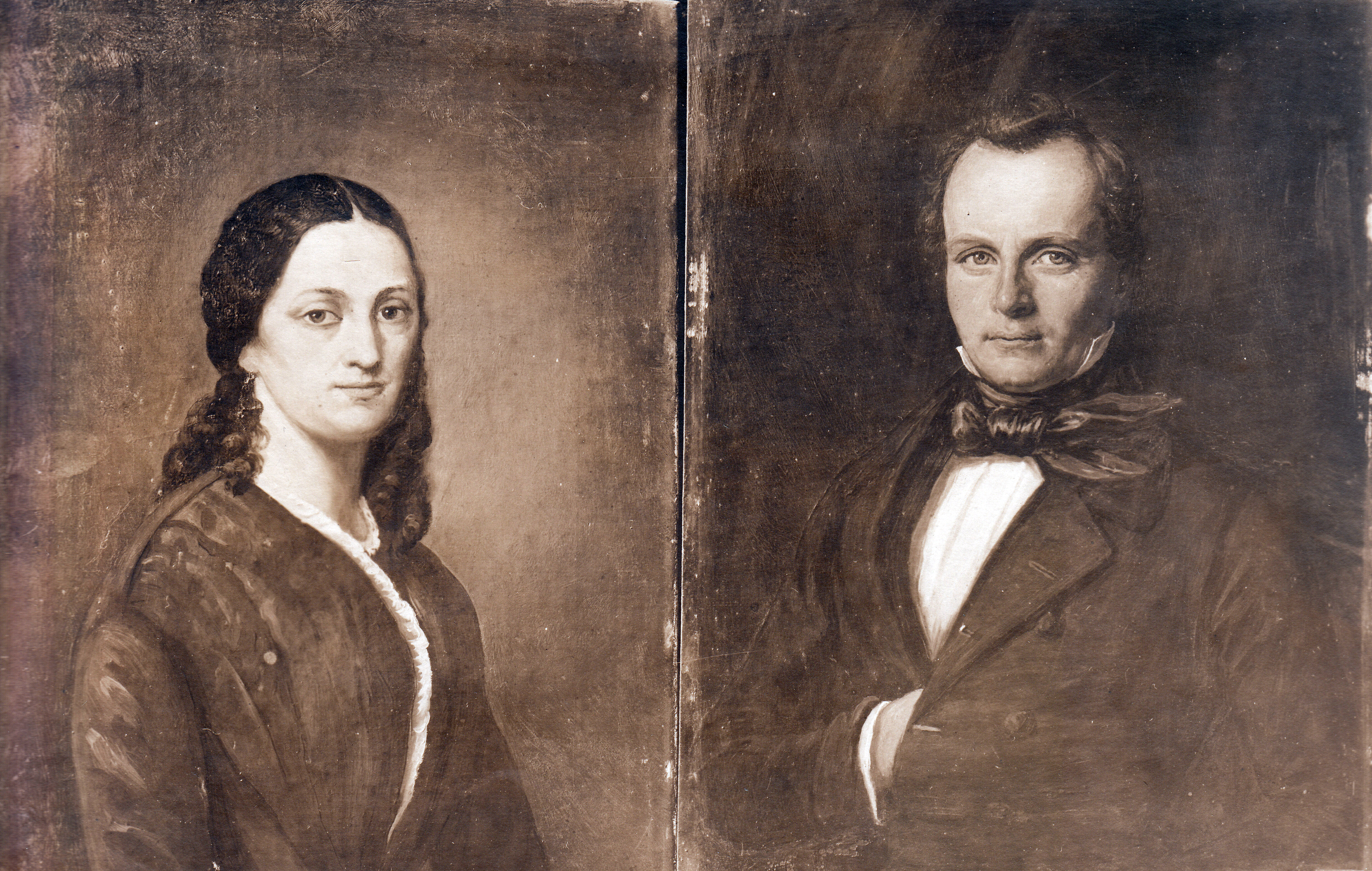 Fotograf: Erik Olsen (1835 - 1920). Format: Fotopositiv. År: 1897. Fra utstillingen i anledning Trondhjems 900-årsjubileum i 1897. Utstillingstekst i Trondhjems 900 Aars Jubilæum: Katalog for Den Historiske Udstilling i Trondhjem 1897: 1012. Løchen, Herman, f. 1822 i Kra., d. 1876 i Inderøen; Proprietær, Eier af Sundnæs i Inderøen. OM., paa Blik, Brystbill. i 1/4 Størr., sign.: J. Gørbitz 1851. * Fru Antonie Løchen. Mer om Herman Løchen.